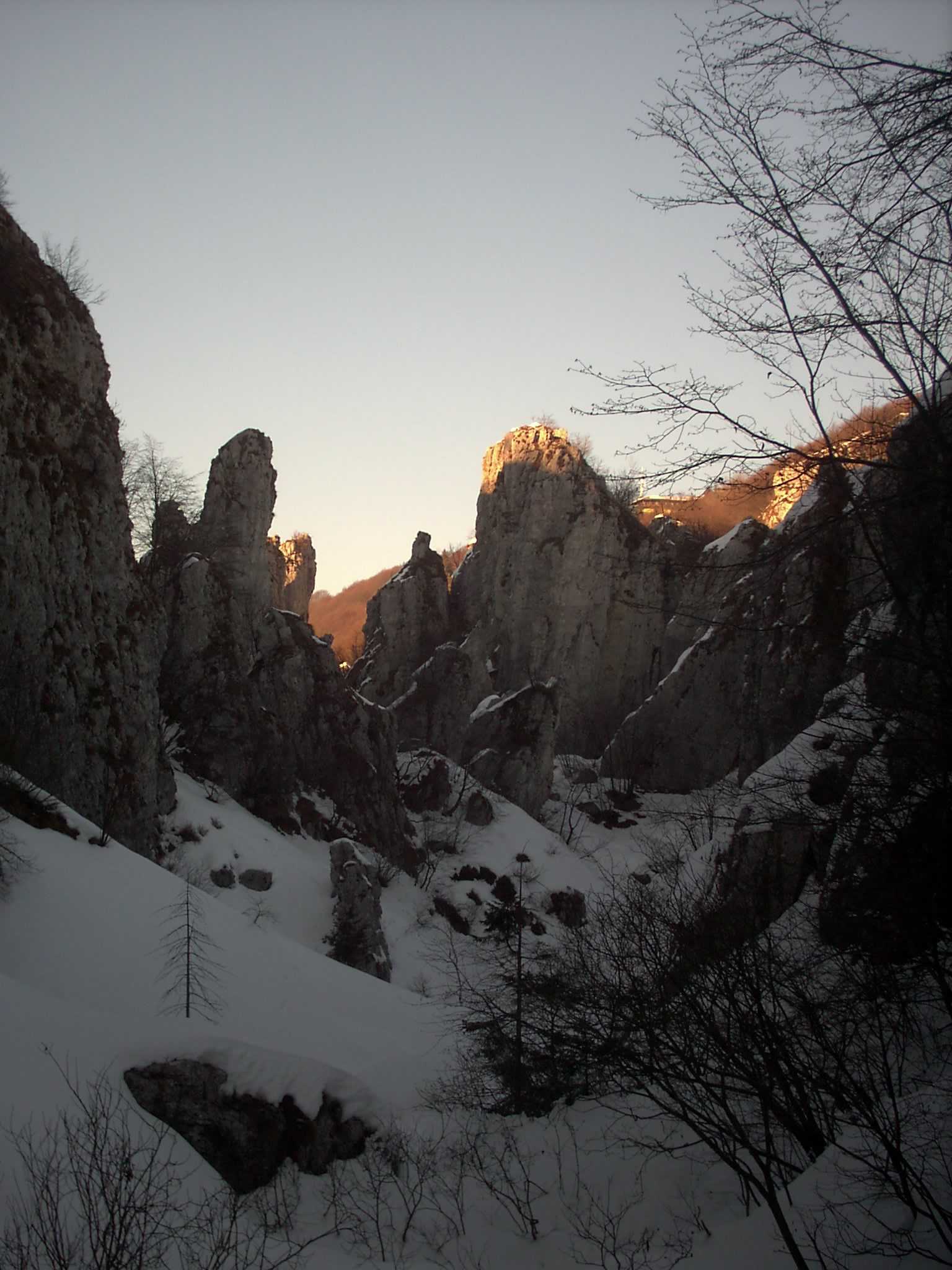 Cornagera, Bergamo, Italia